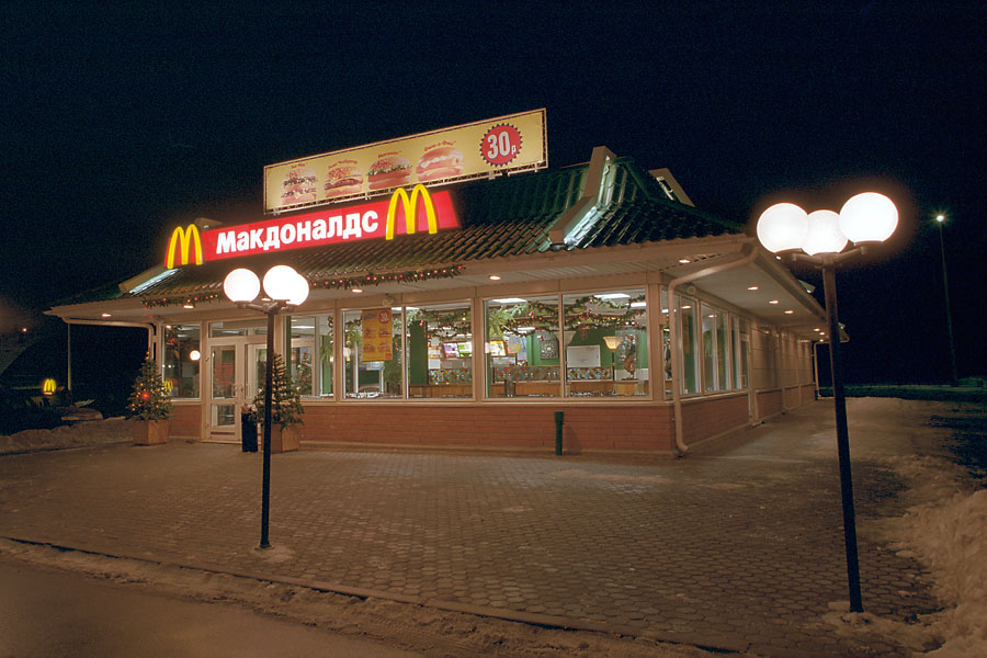 McDonald's in Krasnogorsk, Russia